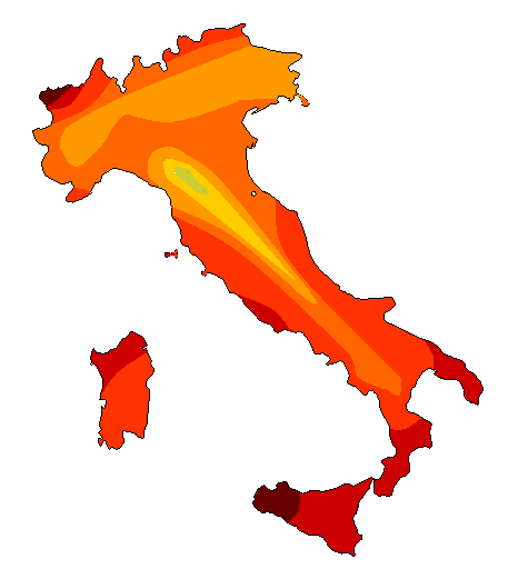 Carta della radiazione solare globale in Italia in giugno 28 MJ/mq